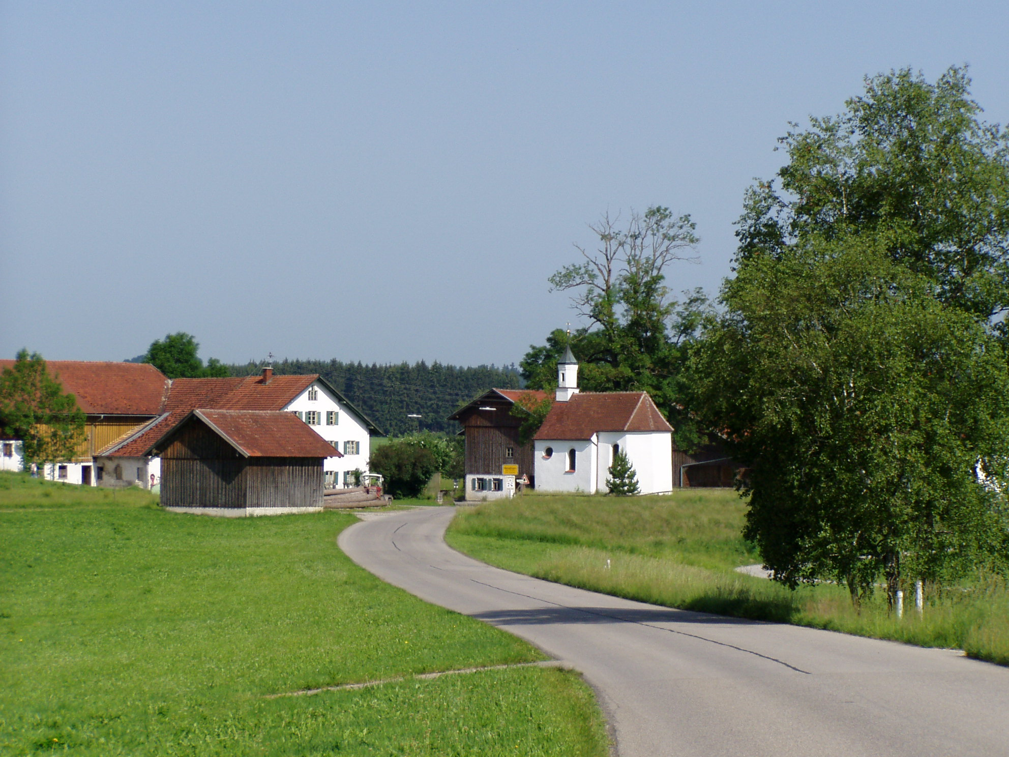 Wenglingen, Aitrang